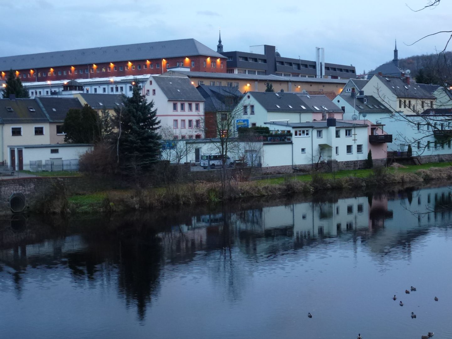 Blick über die Zschopau auf die JVA Waldheim